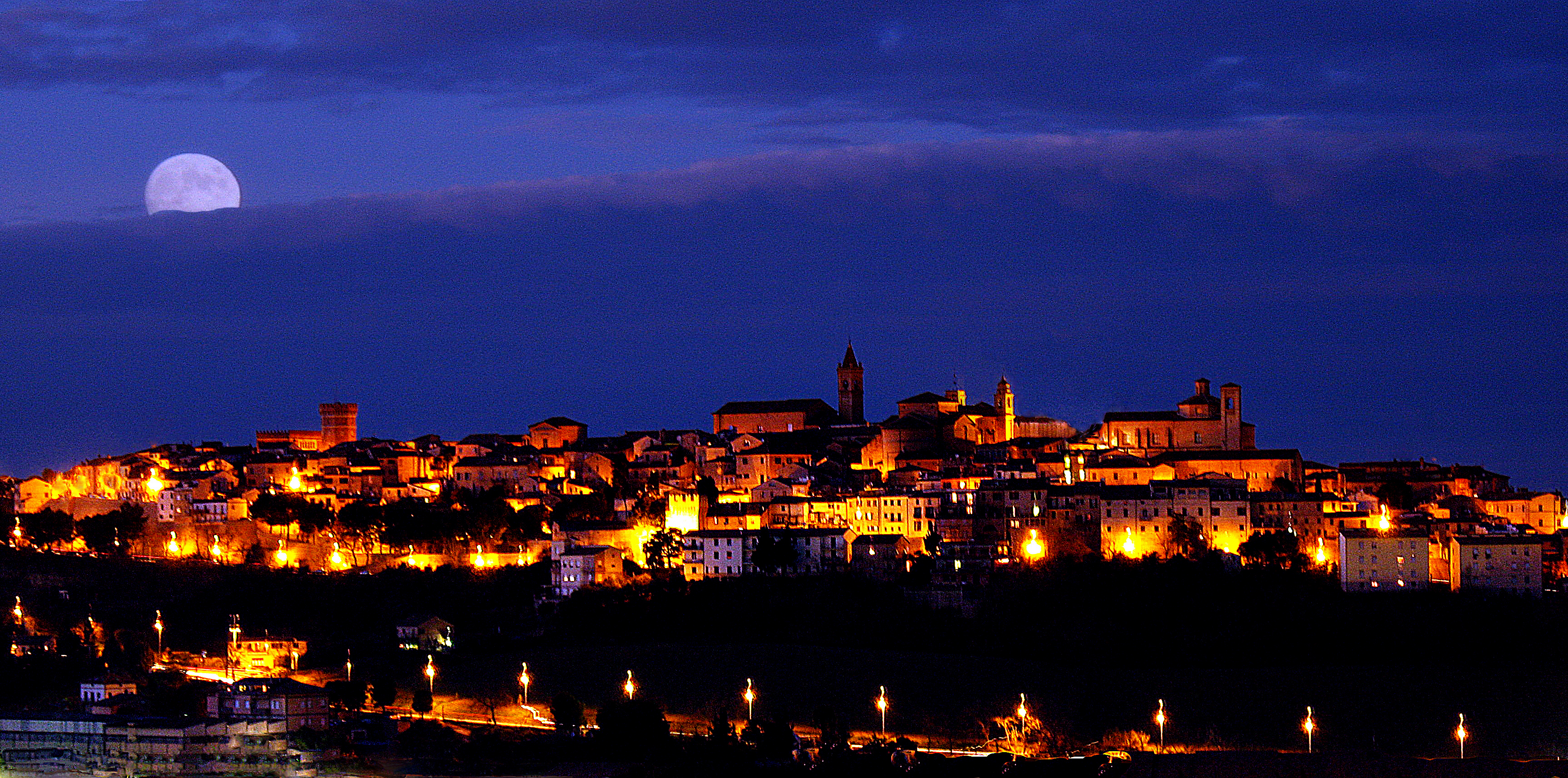 Vista notturna di Civitanova Alta, frazione di Civitanova Marche, Italia.